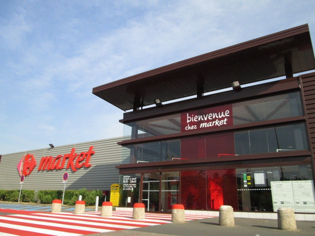 Façade du Carrefour Market de Trevoux